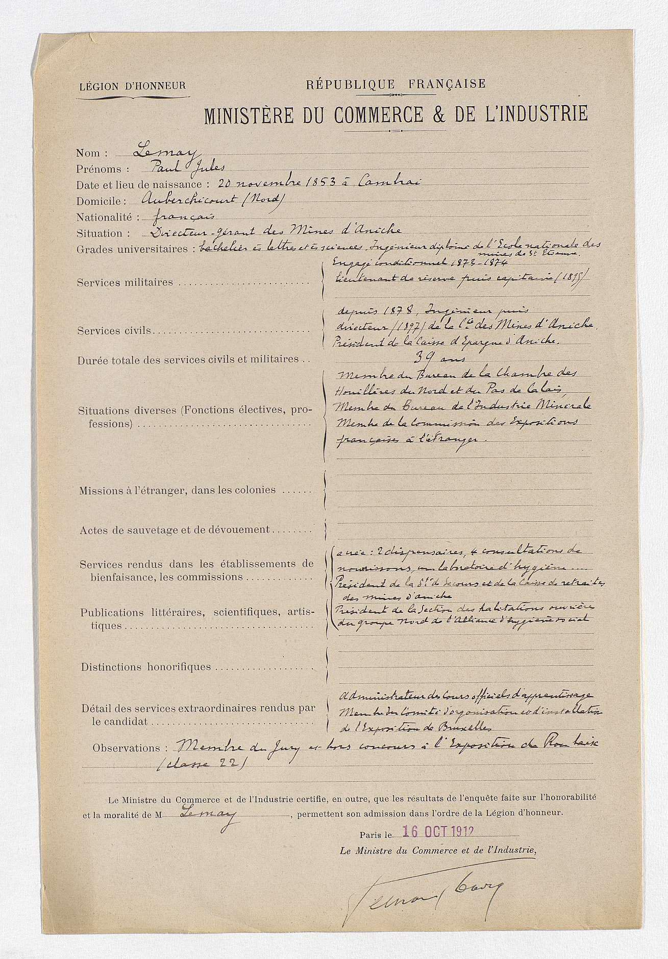 Paul Jules Lemay - Fiche renseignements - légion d'Honneur